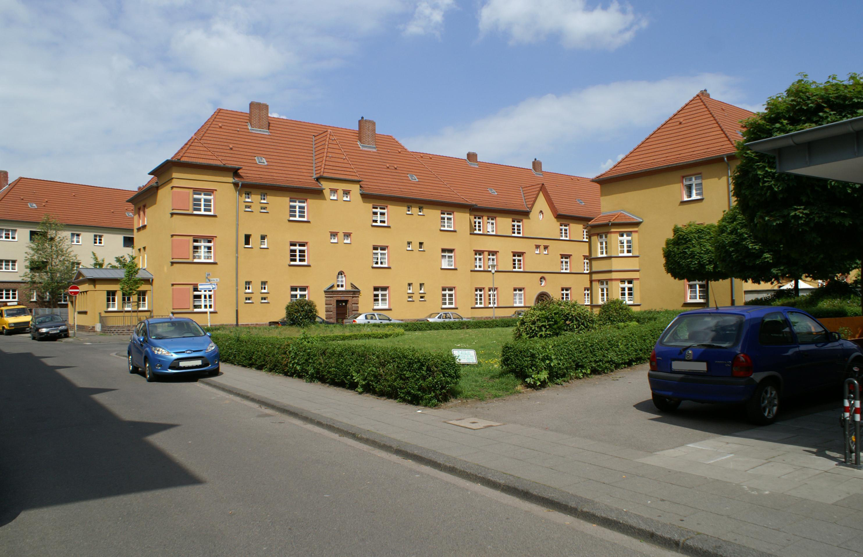 Grünanlage an der Ecke Kösener Weg/Erfurter Straße in der Germaniasiedlung Köln-Höhenberg